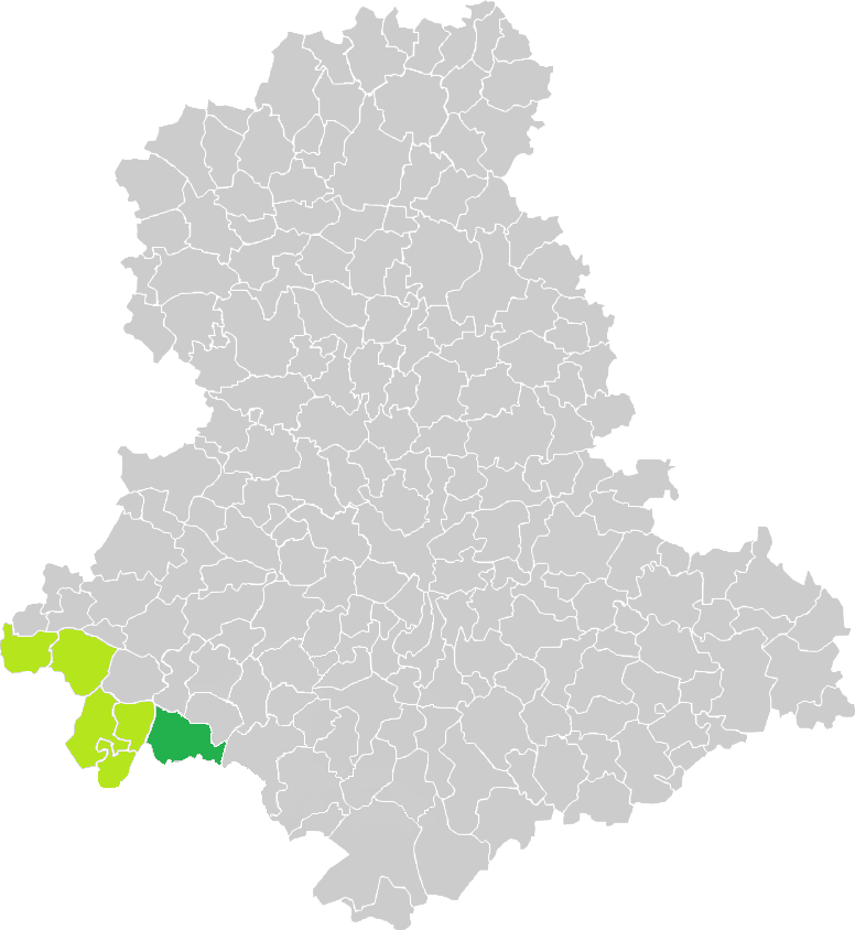 Carte de situation de la commune de Dournazac (en vert foncé) dans le votre Canton (en vert clair) sur une carte des communes de la Haute-Vienne